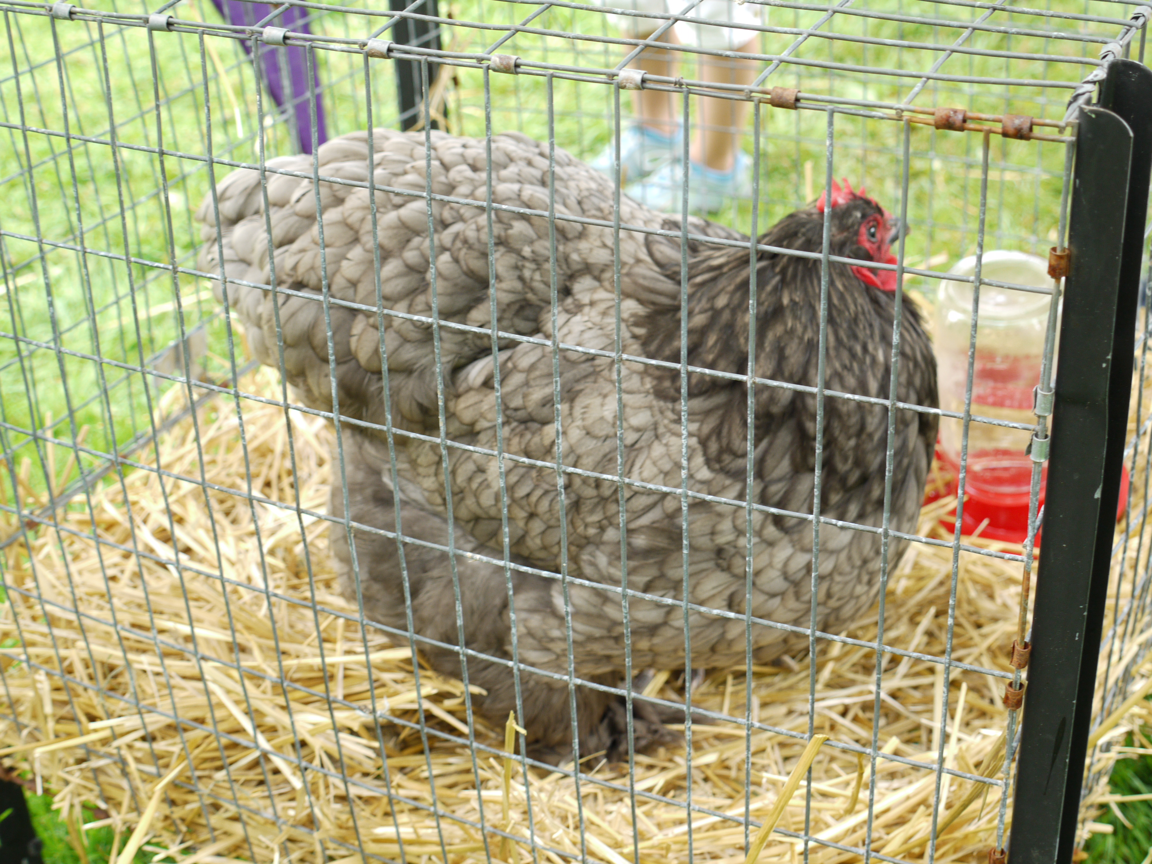 A Blue Cochin chicken.